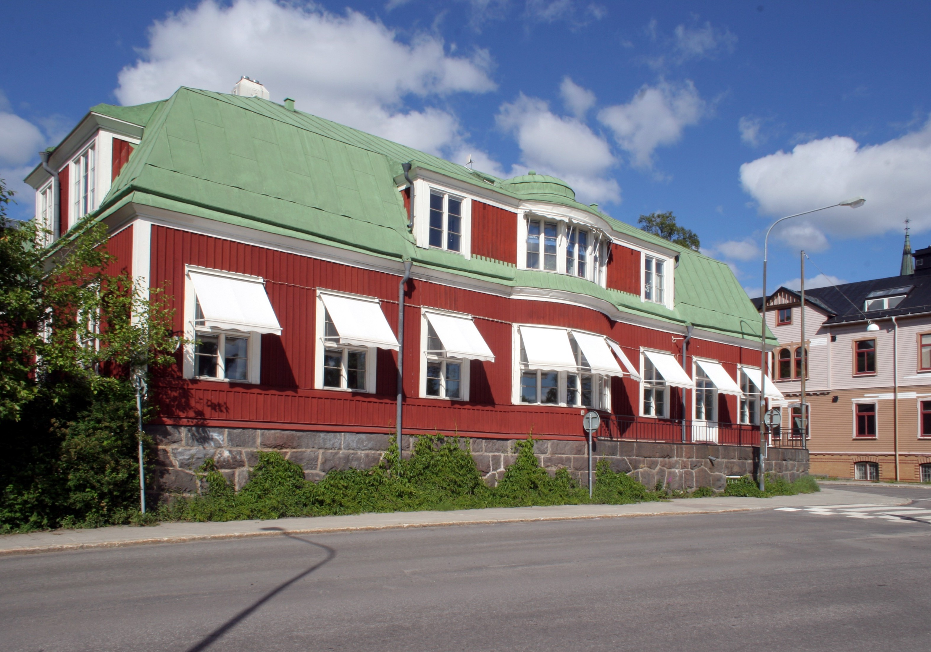 Aschanska villan in Umeå Sweden.